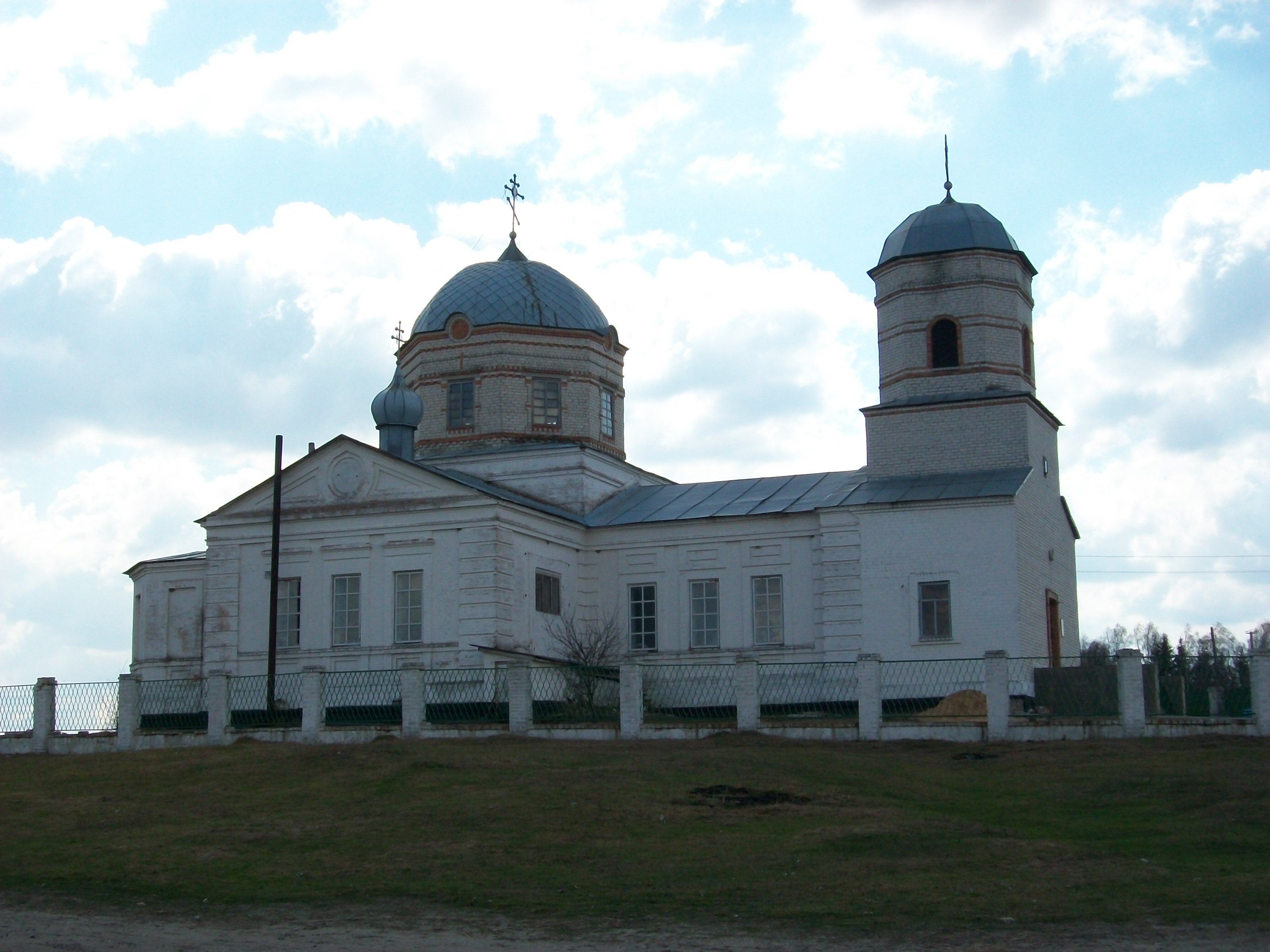 Церква у Шалигино